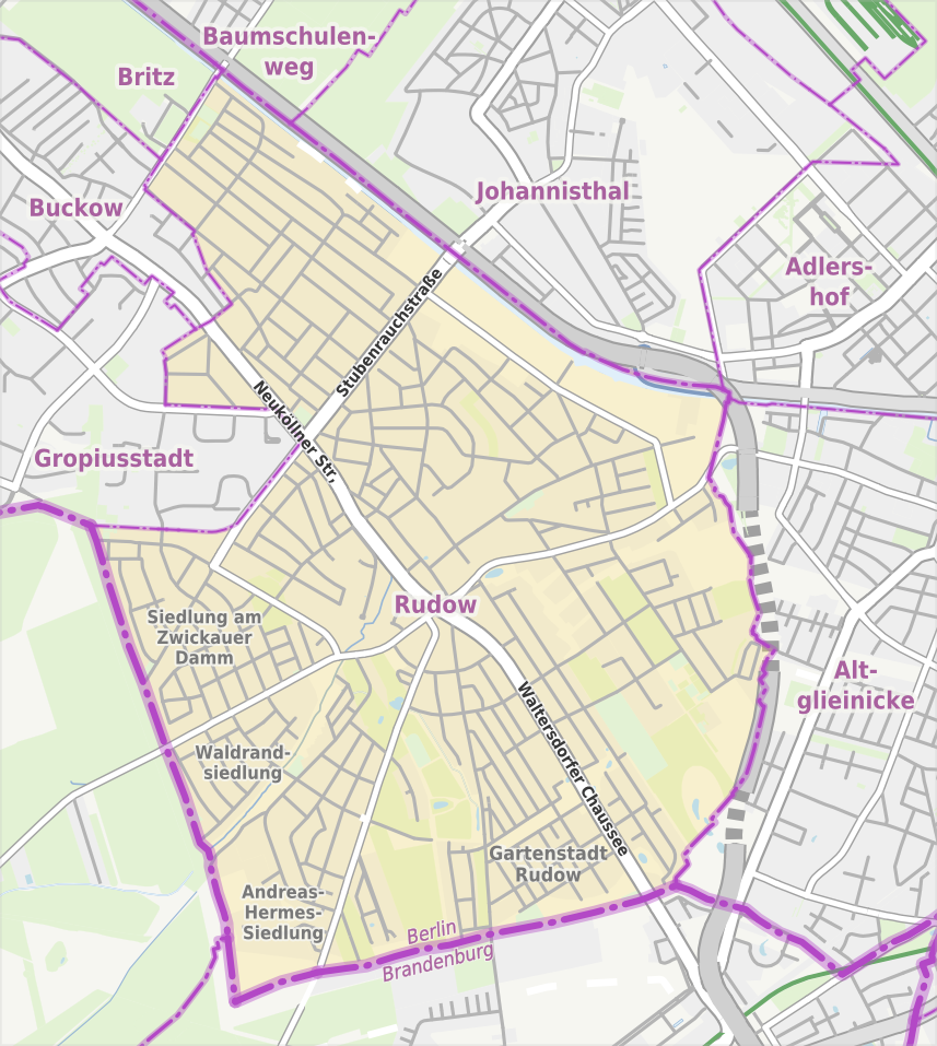 Übersichtskarte der Straßen und Ortslagen in Berlin-Rudow